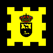 Bandera de San Martín de la Vega, en Madrid (España)